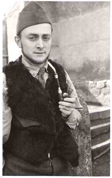 Ritratto di Yonnet